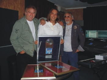 Michael Dorth Gold Verleihung mit den AMIGOS